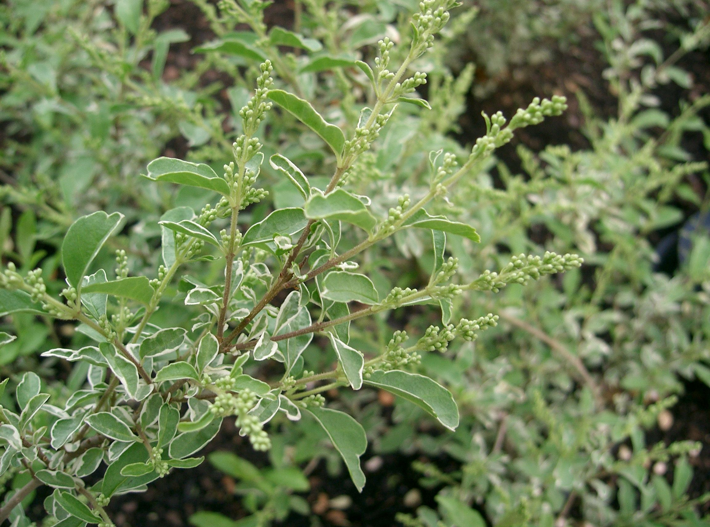 Ligustrum sinense 'Variegatum'